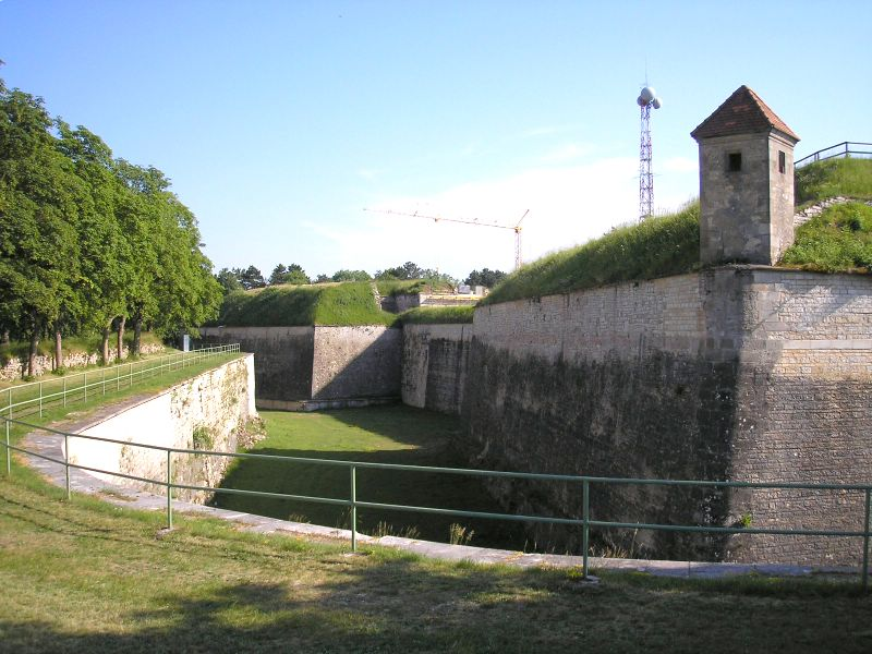 Festung Wülzburg über Weißenburg (Mittelfranken) / Fortress Wuelzburg near Weissenburg, Middle Franconia, Germany. Teil der Festungsanlagen / Part of the fortifications. Eigene Aufnahme, Juli 2006 / Own photo, July 2006